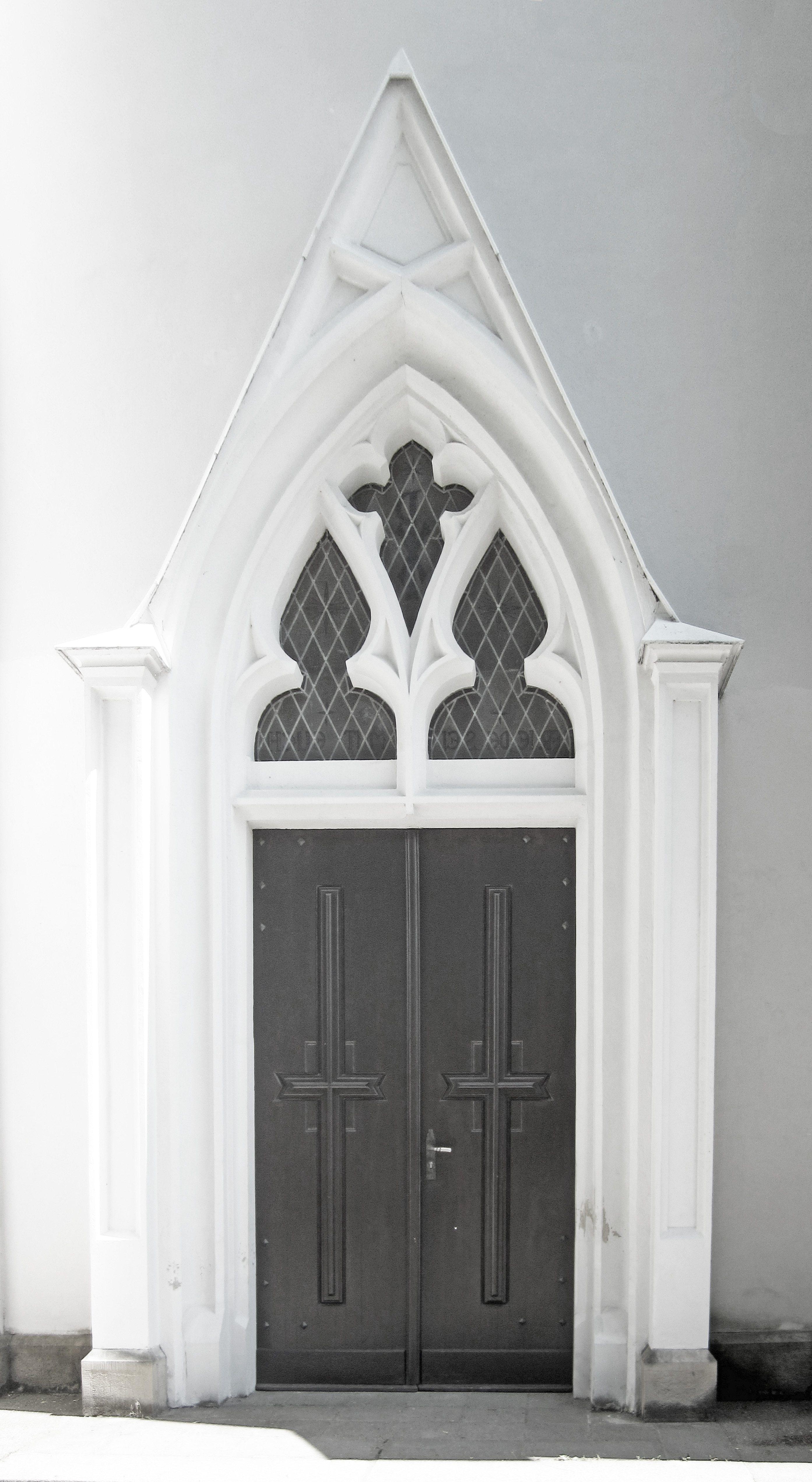 Kirche Portitz, Portal, Leipzig